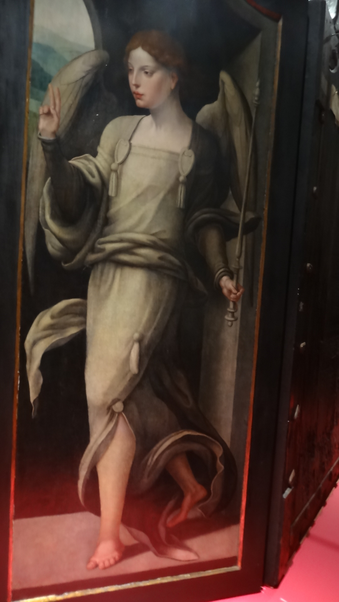 S. Gabriel - reverso do painel direito do Tríptico de S. Tiago Menor e S. Filipe, de cerca de 1527-31, atribuido ao pintor flamengo Pieter Coecke van Aelst, proveniente da Igreja do Socorro, no Funchal, ilha da Madeira